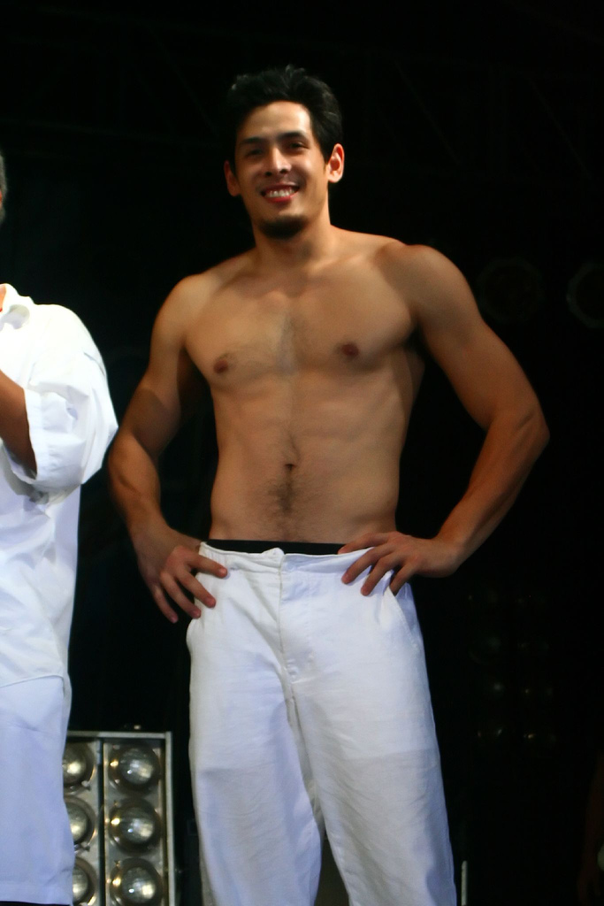 Filipino actor Christian Vasquez